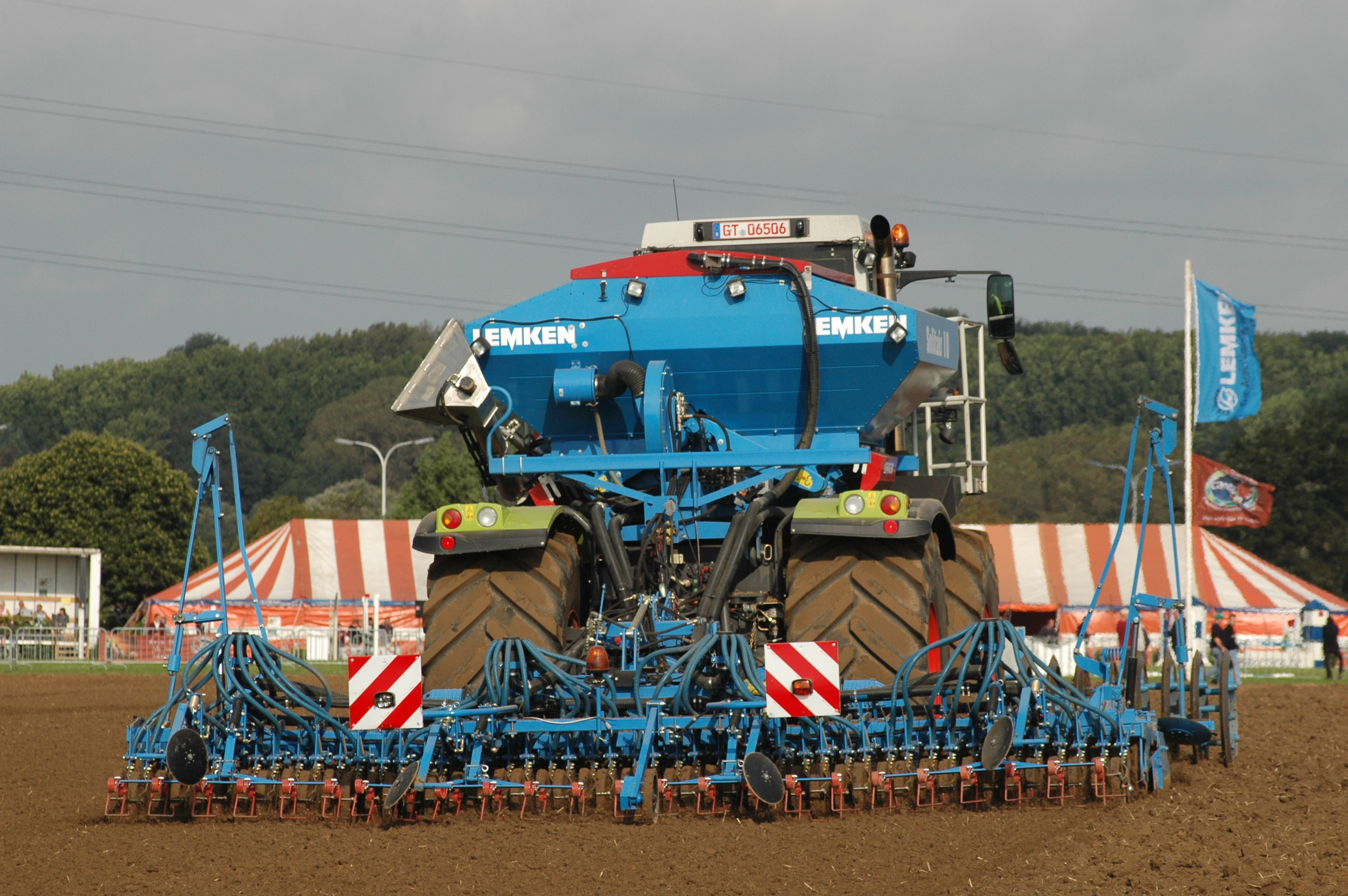 Claas Xerion 3300 Saddle Trac mit Lemken-Frontpacker und pneumatischer Drillmaschine Solitair 10 von Lemken (Saatguttank im Aufbauraum des Xerion), Werktuigendagen 2005